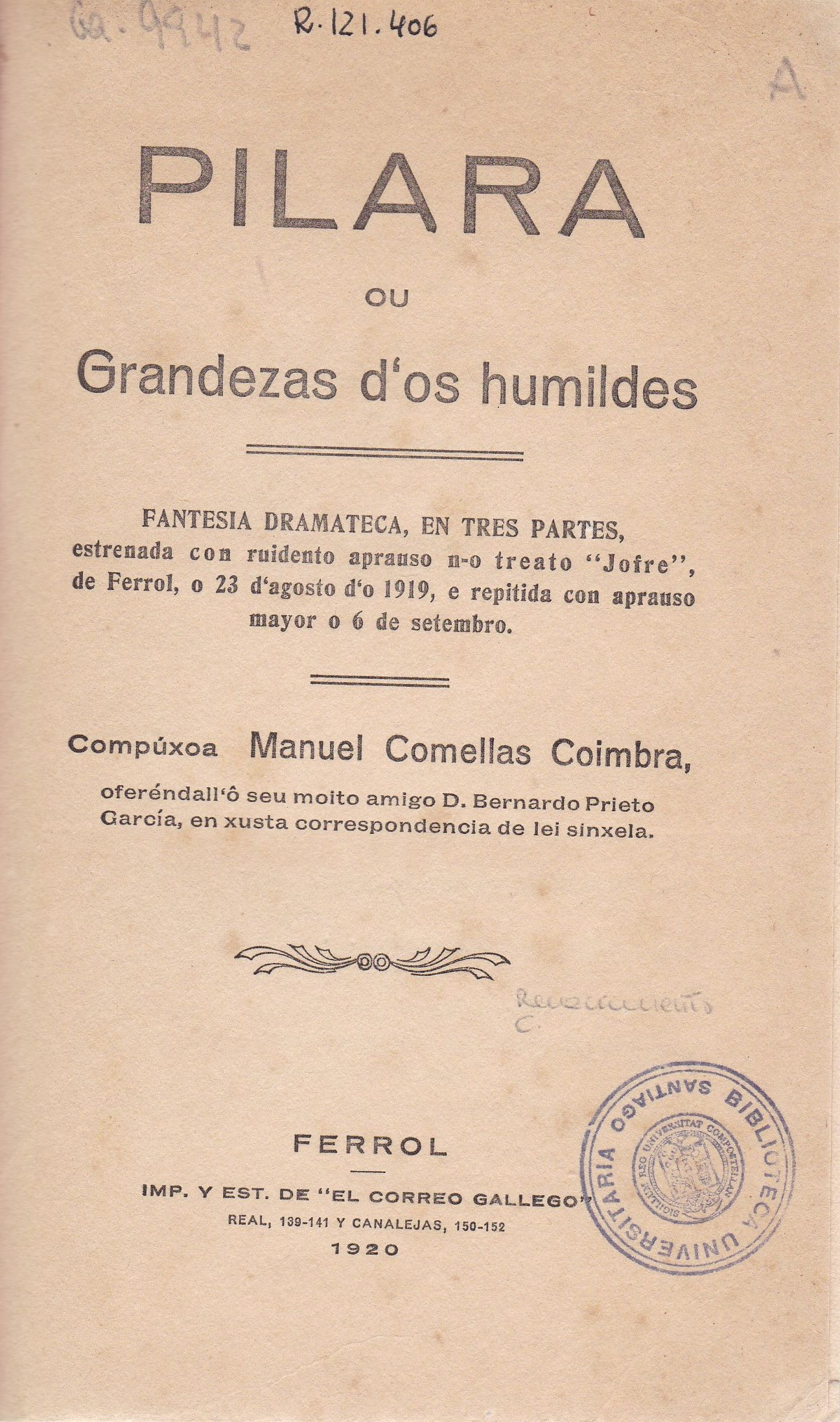 Portada interior do libro Pilara de Manuel Comellas Coímbra